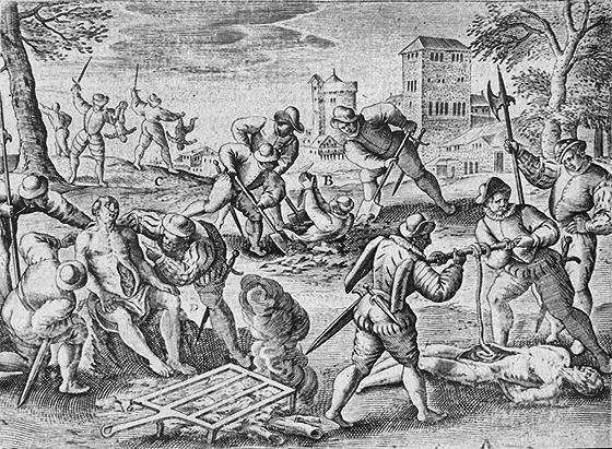 Extract from "Theatre_des_cruautez_des_Hereticques_de_nostre_temps"